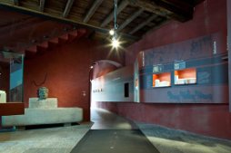 MUST museo del territorio Sala Sulle strade del Medioevo